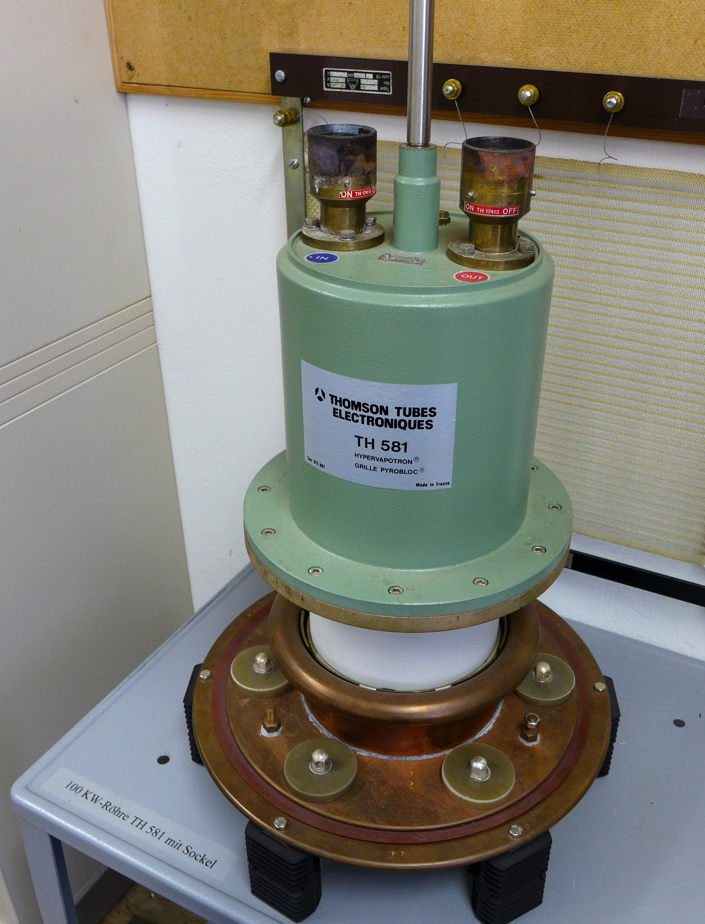 Endröhre TH 581 mit 100 kW der Firma Thomson Tubes Electroniques